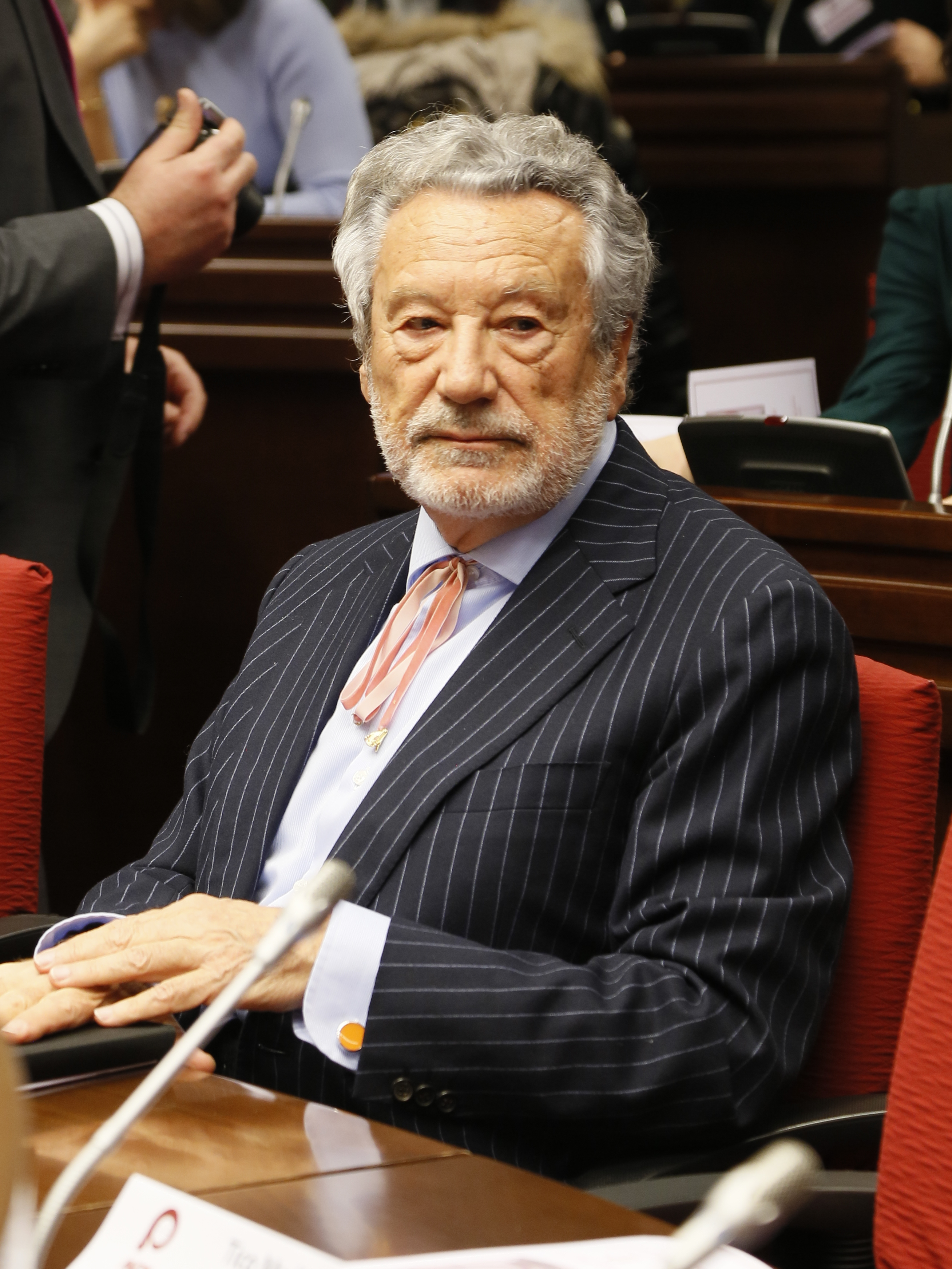 Entrega de los Premios ¡Bravo! 2018